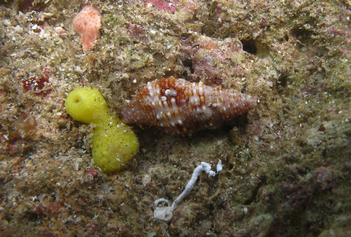 Prodotia iostoma à la Réunion. Détermination = R. Huet.